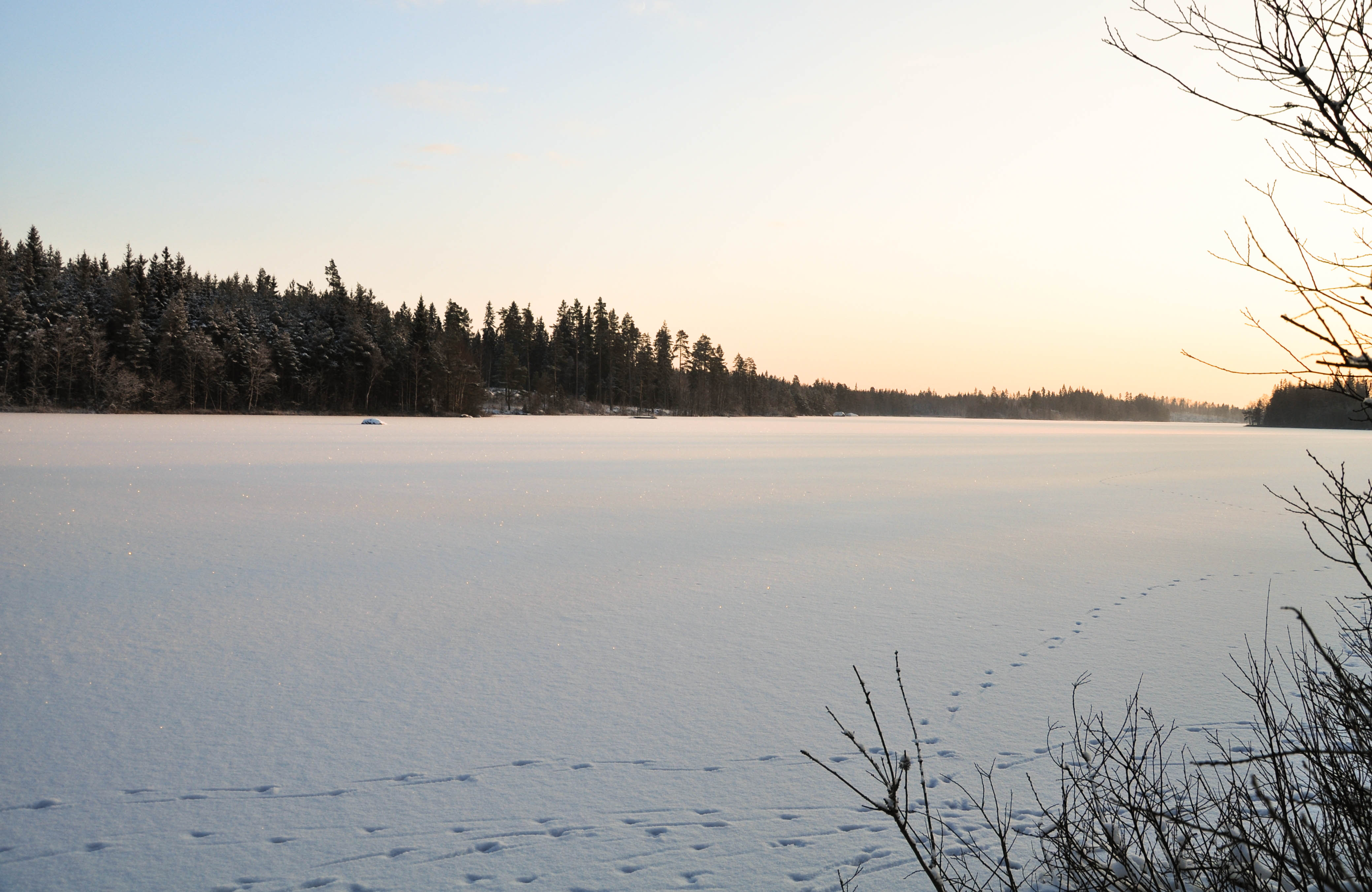 Olasjön december 2009